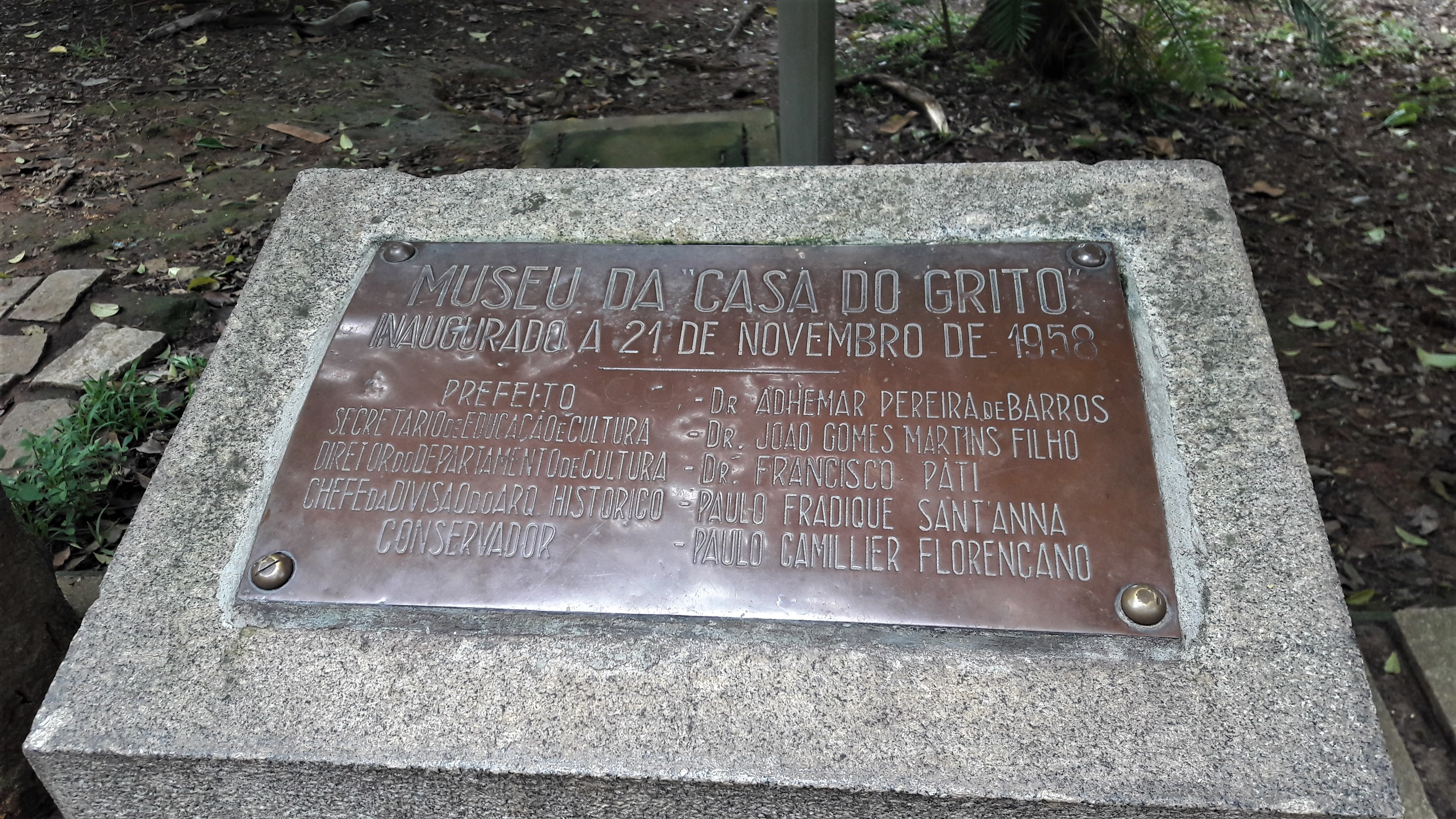 Placa do Museu da Casa do Grito. Cultural property Casa do Grito, São Paulo (city), São Paulo (state), Brazil Q9698852, P727